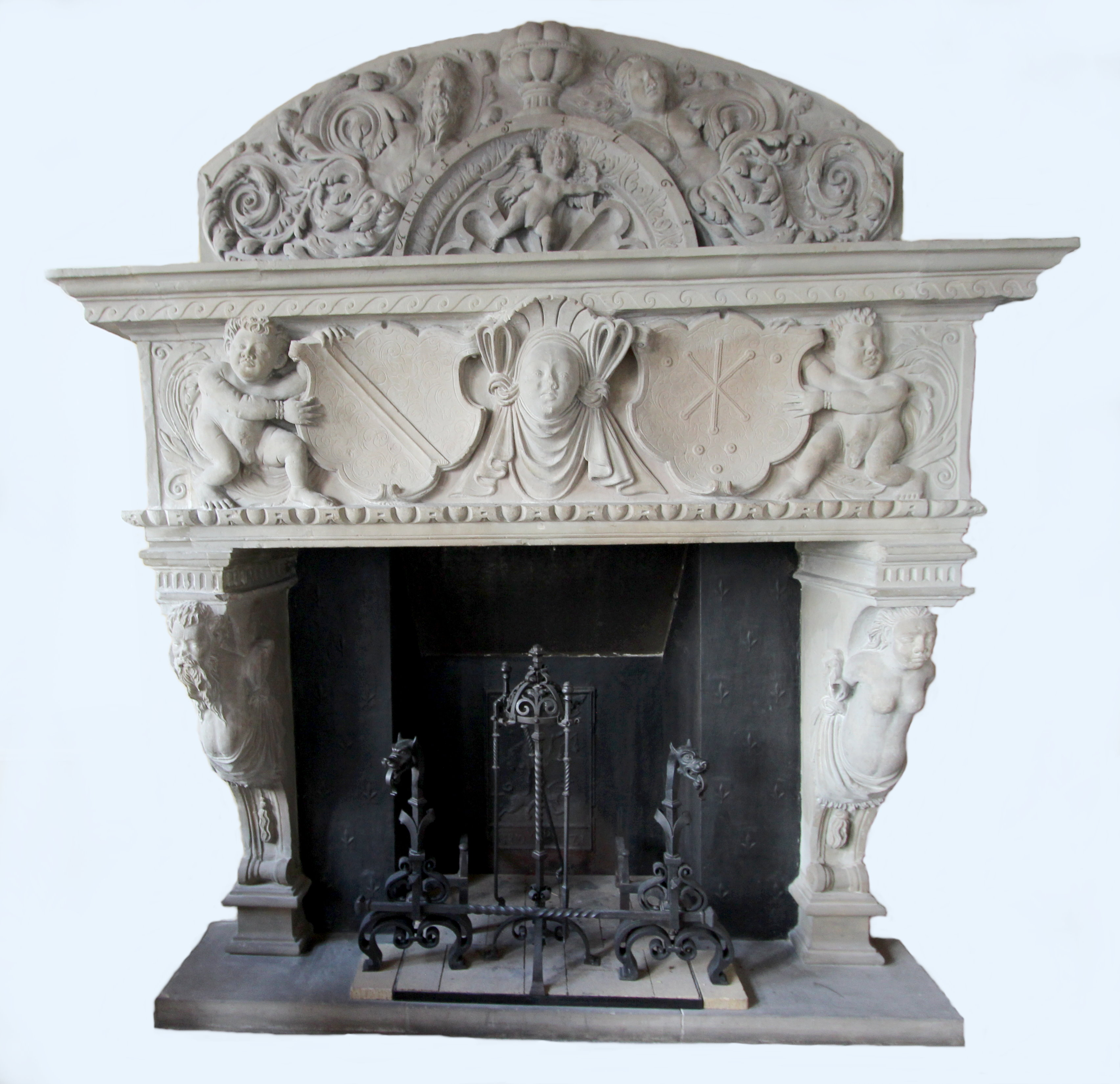 54634 Bitburg, Hauptstraße 43. Der Cobenturm war ein Wohnturm aus dem 16. Jahrhundert. Er wurde im Zweiten Weltkrieg stark beschädigt und daher 1947 abgebrochen. Architekturteile der Innenausstattung und der Fassadenreliefs befinden sich heute im Kreismuseum Bitburg-Prüm, im Rathaus und im Eingangsbereich der Stadthalle/Bitburger Markenerlebniswelt. Im kleinen Sitzungssaal des Rathauses wurde der Kaminaufsatz aus dem 1944 zerstörten Cobenturm eingelassen. Aufnahme von 2018.